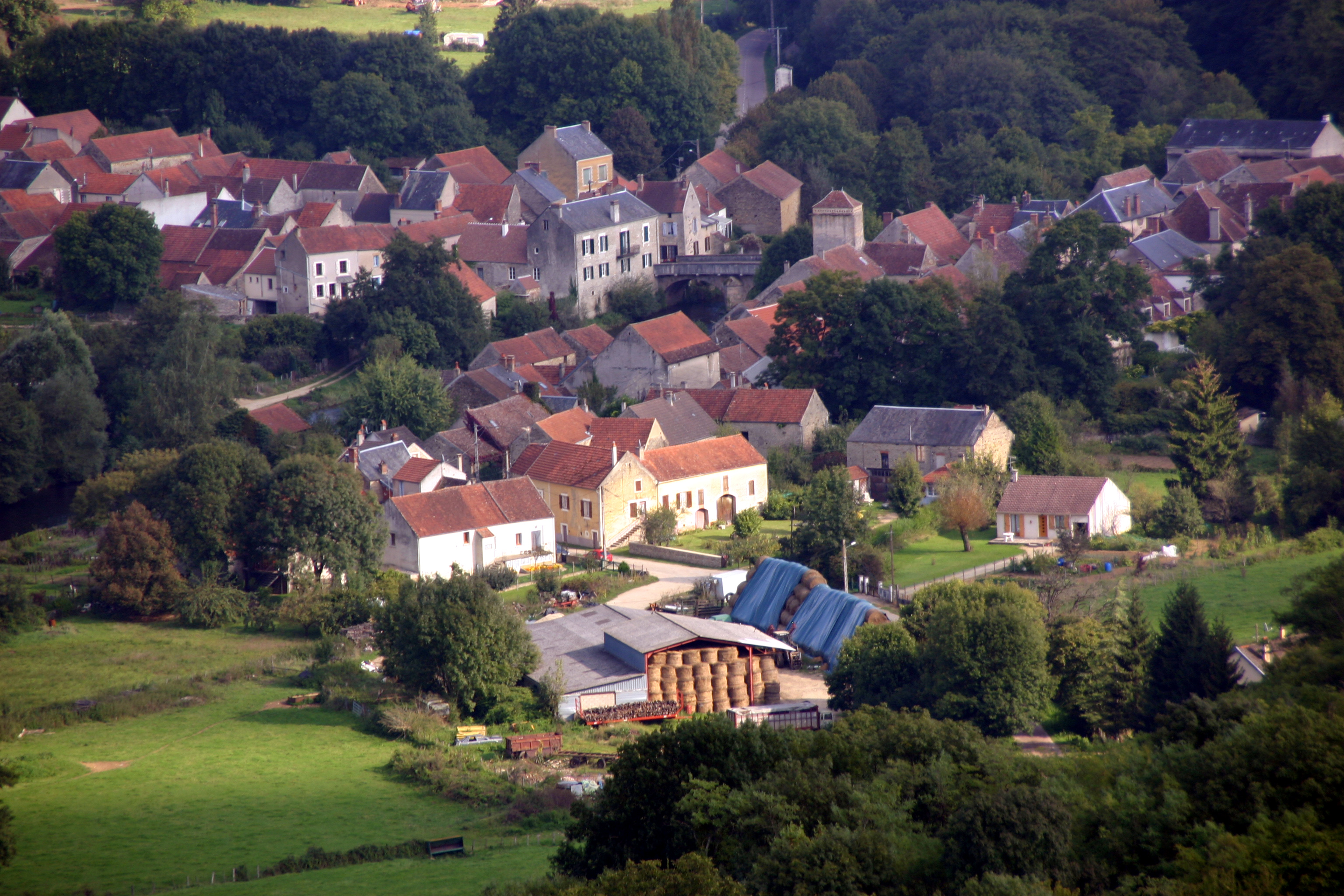 Saint-Père (Yonne)